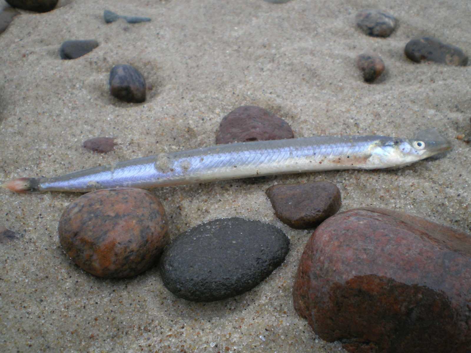 martwy tobiasz (ryba), dead ammodytes tobianus